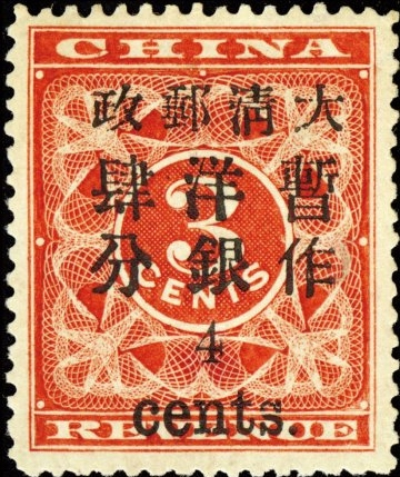 發行逾百年屬自由版權之大清郵票-紅印花小肆分票